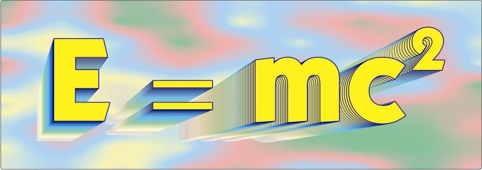 Albert Einstein equation